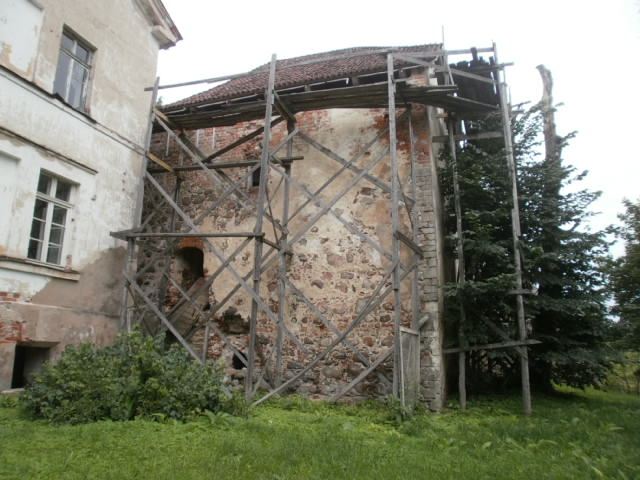 Linnuse elutorn lõunast.